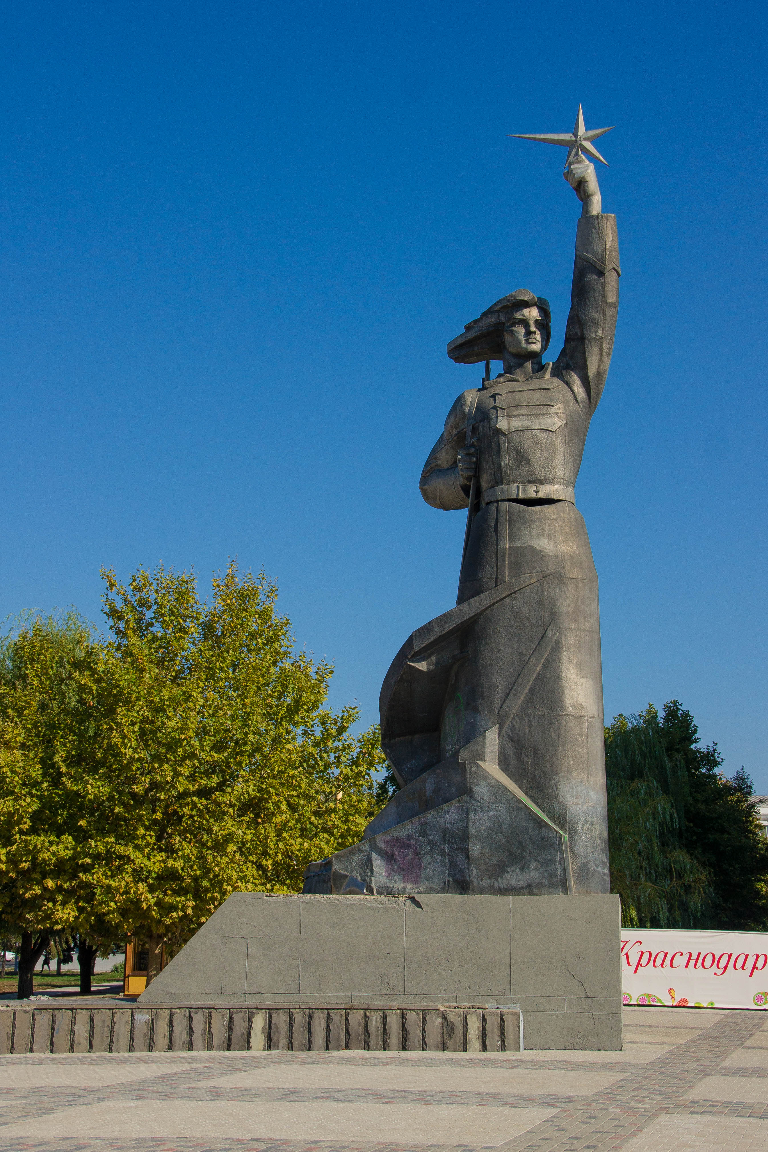 здание к/т 'аврора'. (Краснодарский край, Краснодар, улица Красная, 169)